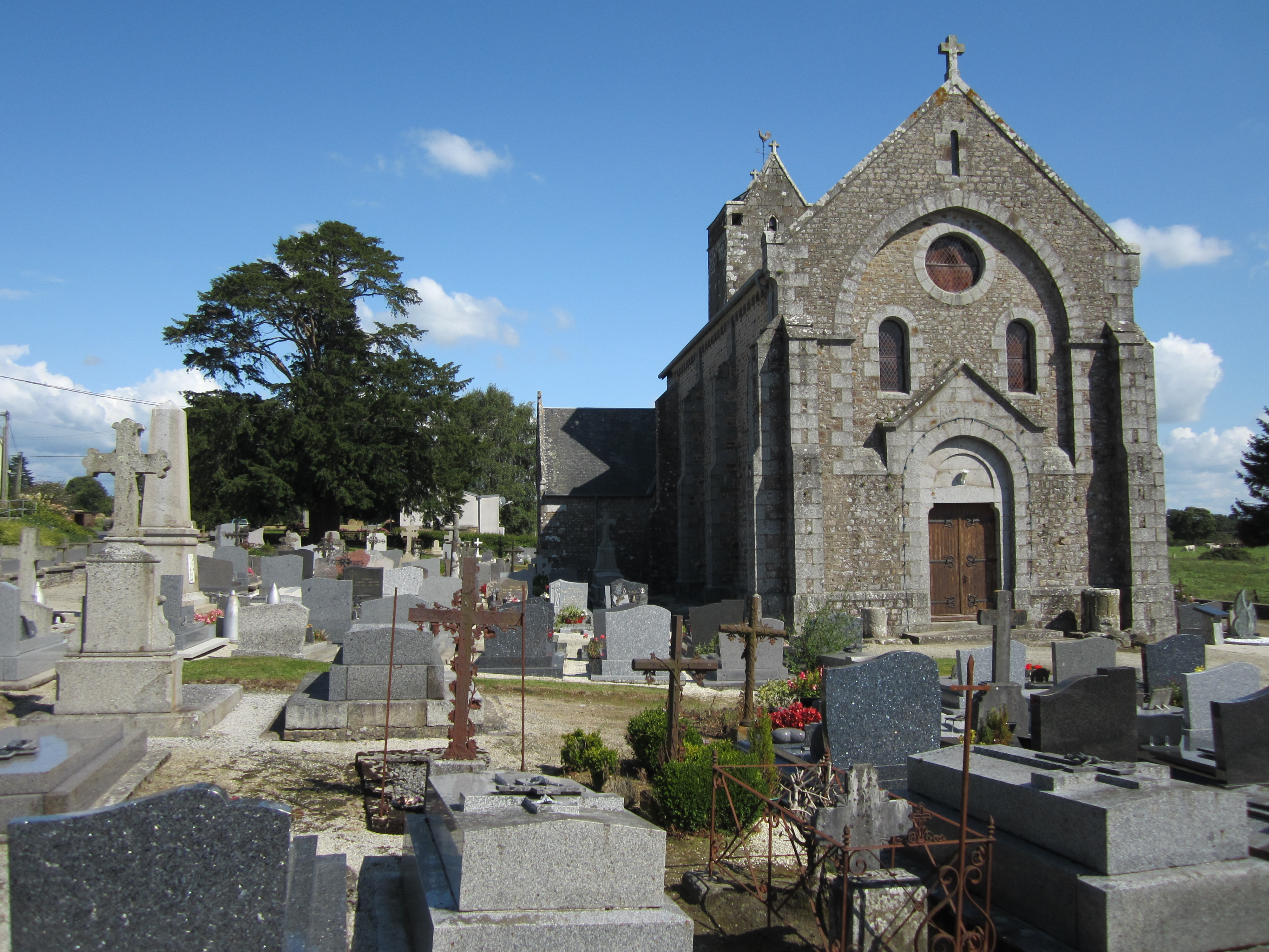 Subligny, Manche